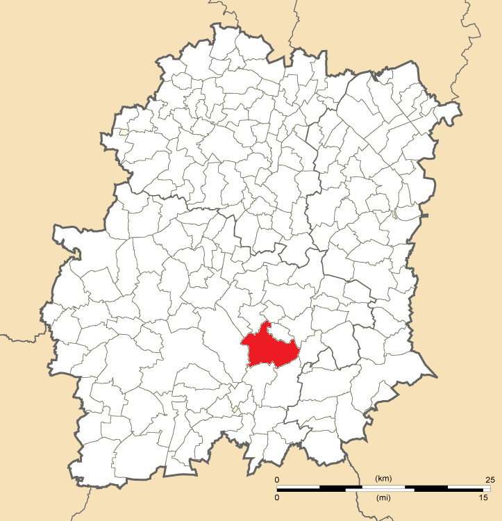 Carte de position de Bouville en Essonne (91)